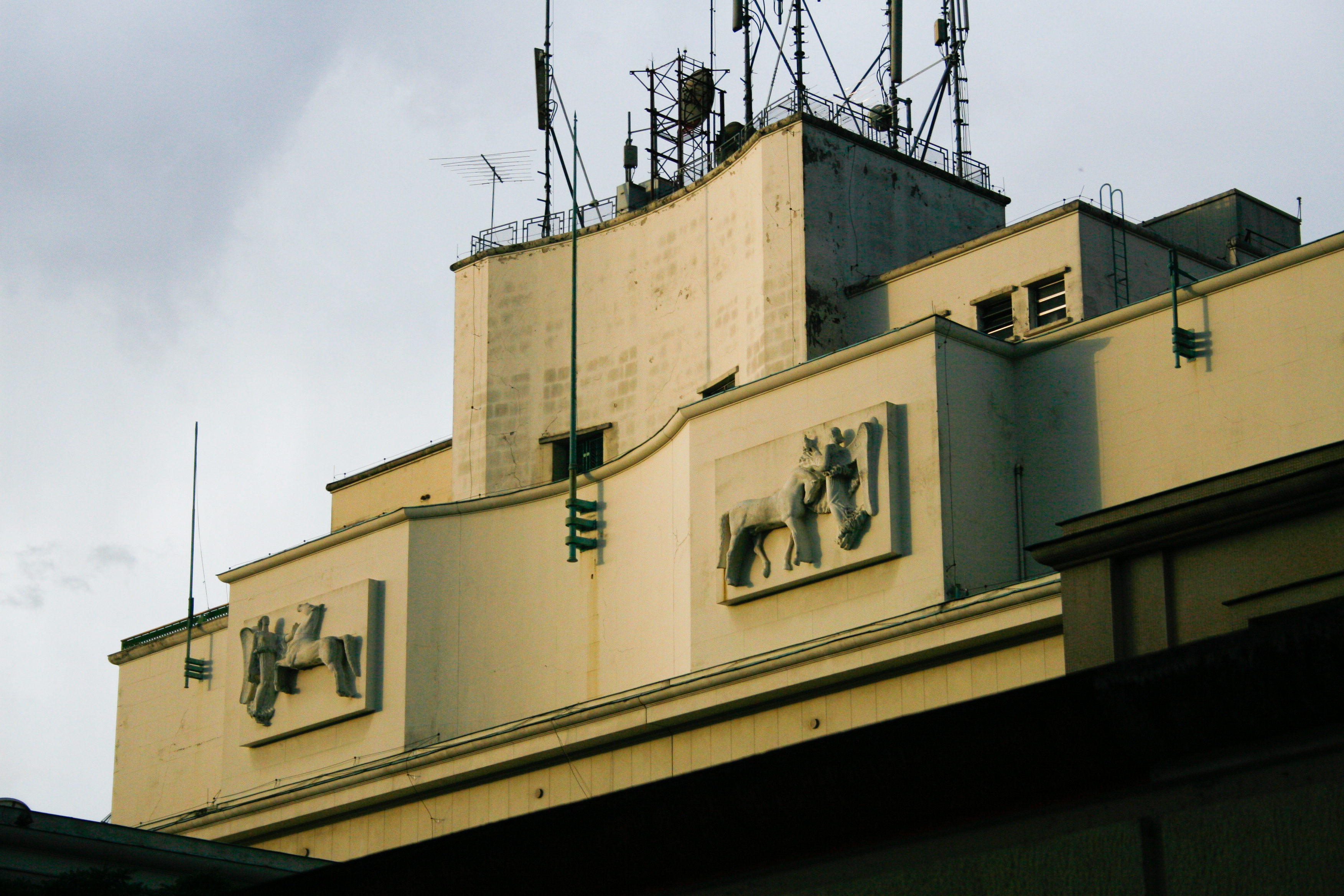 Avenida Lineu de Paula Machado, 1263, Cidade Jardim. Foto por André Deak para o Arte Fora do Museu (